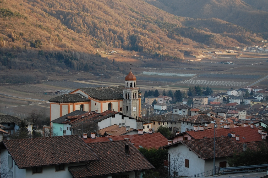 vista di Cavedine dalla strada per il Lago. In primo piano la chiesa parrocchiale del capoluogo Licensing CC-BY-2.5